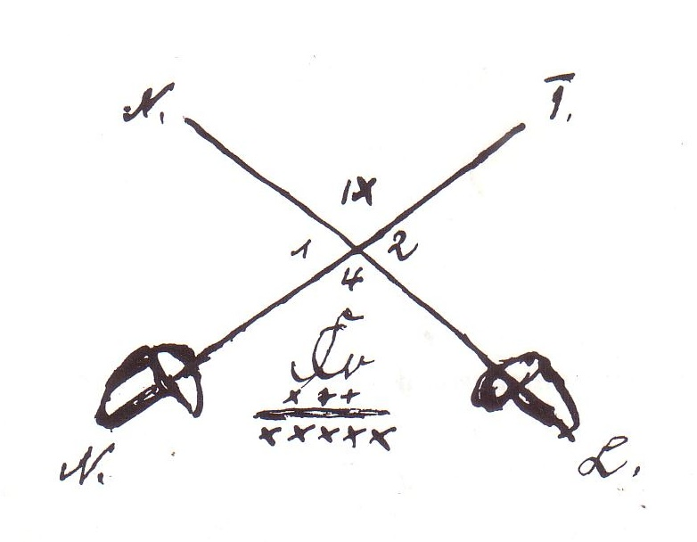 Bundeszeichen des Corps Saxonia Jena in der Constitution von 1812, mit Stiftungsdatum 4.IX.[18]12